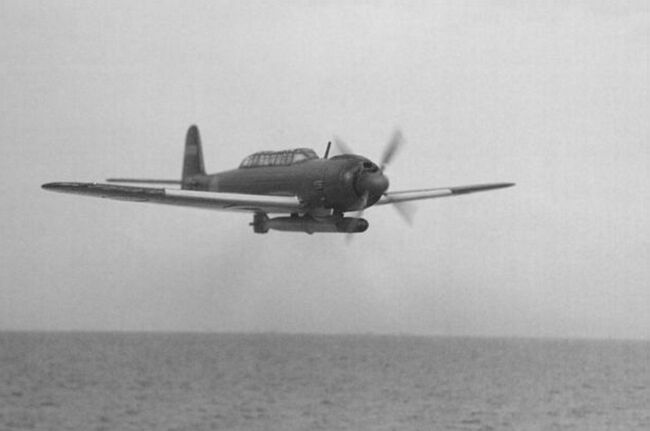 雷装した天山